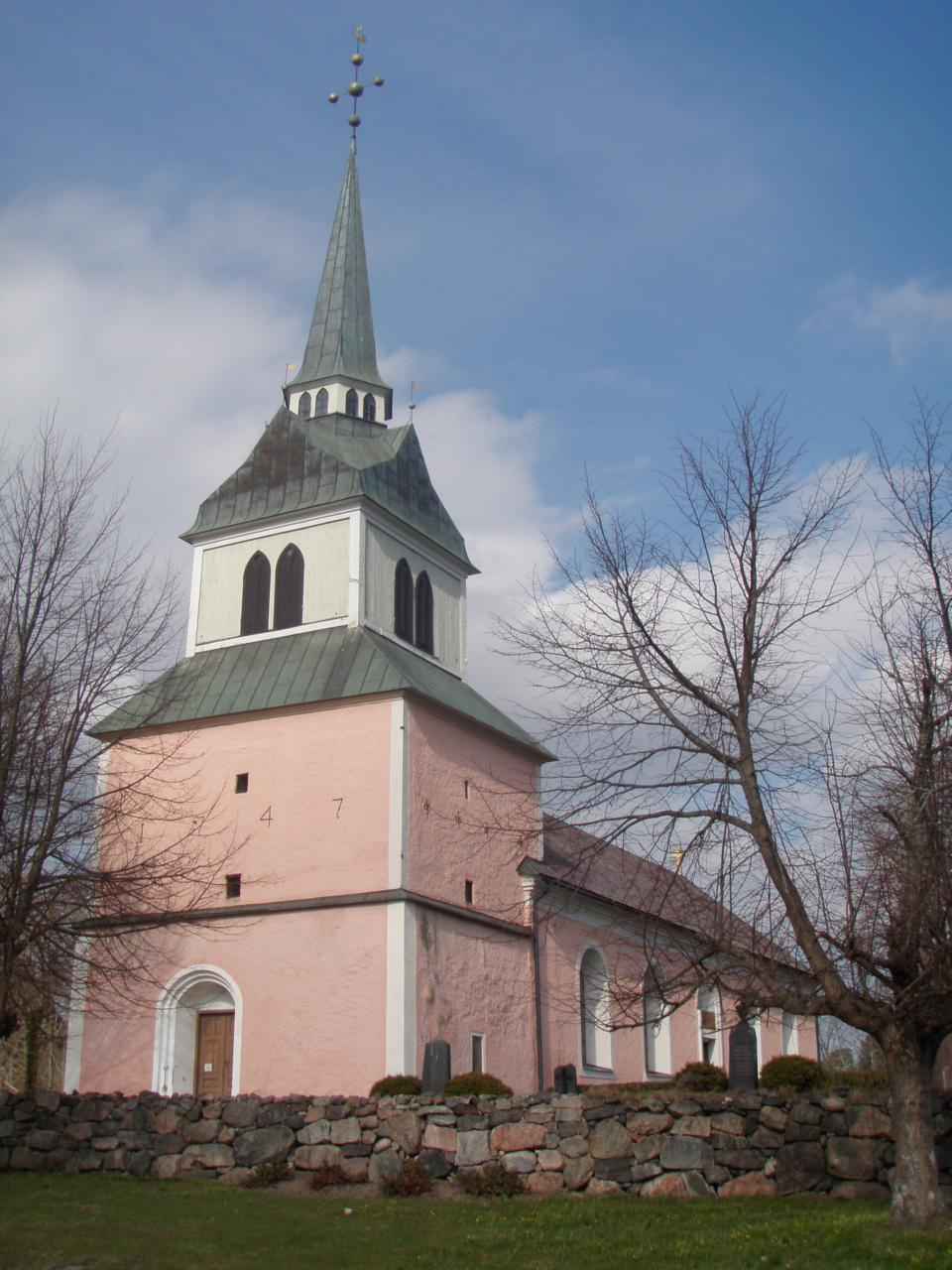 Östra Ny kyrka i Linköpings stift